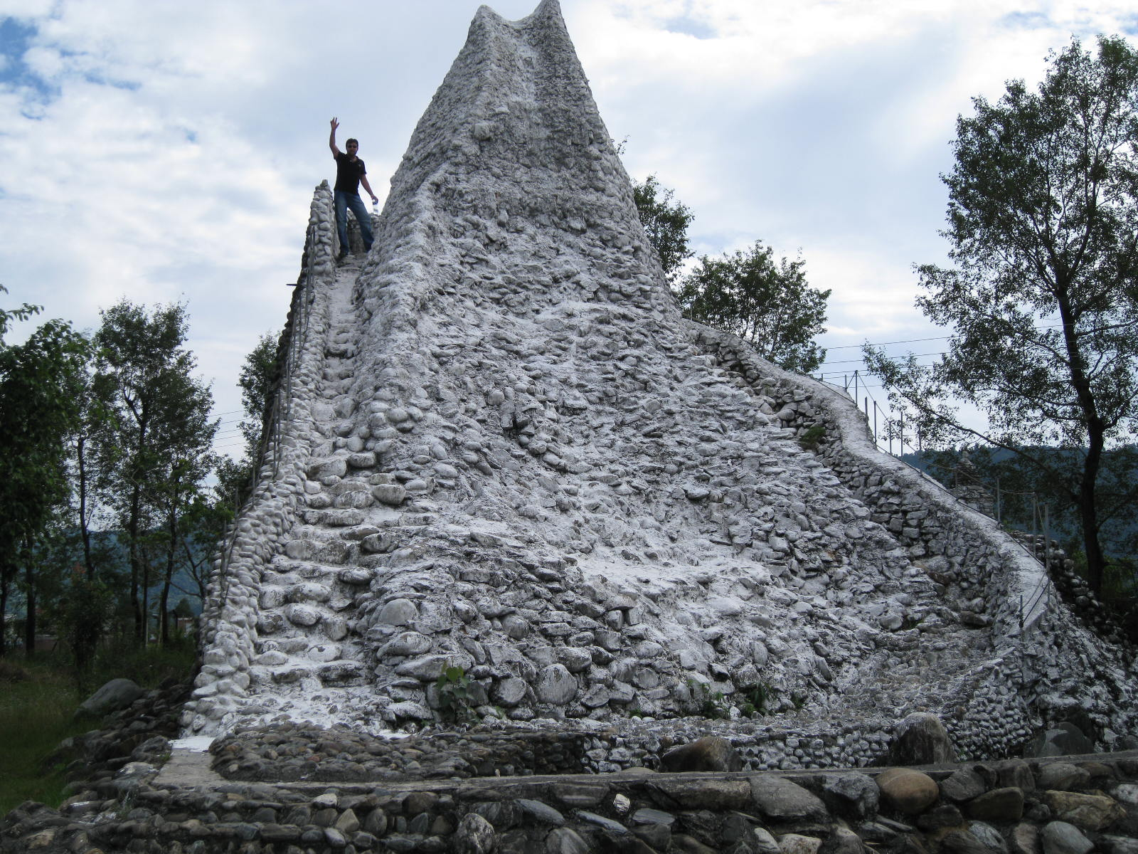 International Mountain Museum, Pokhara, Nepal.